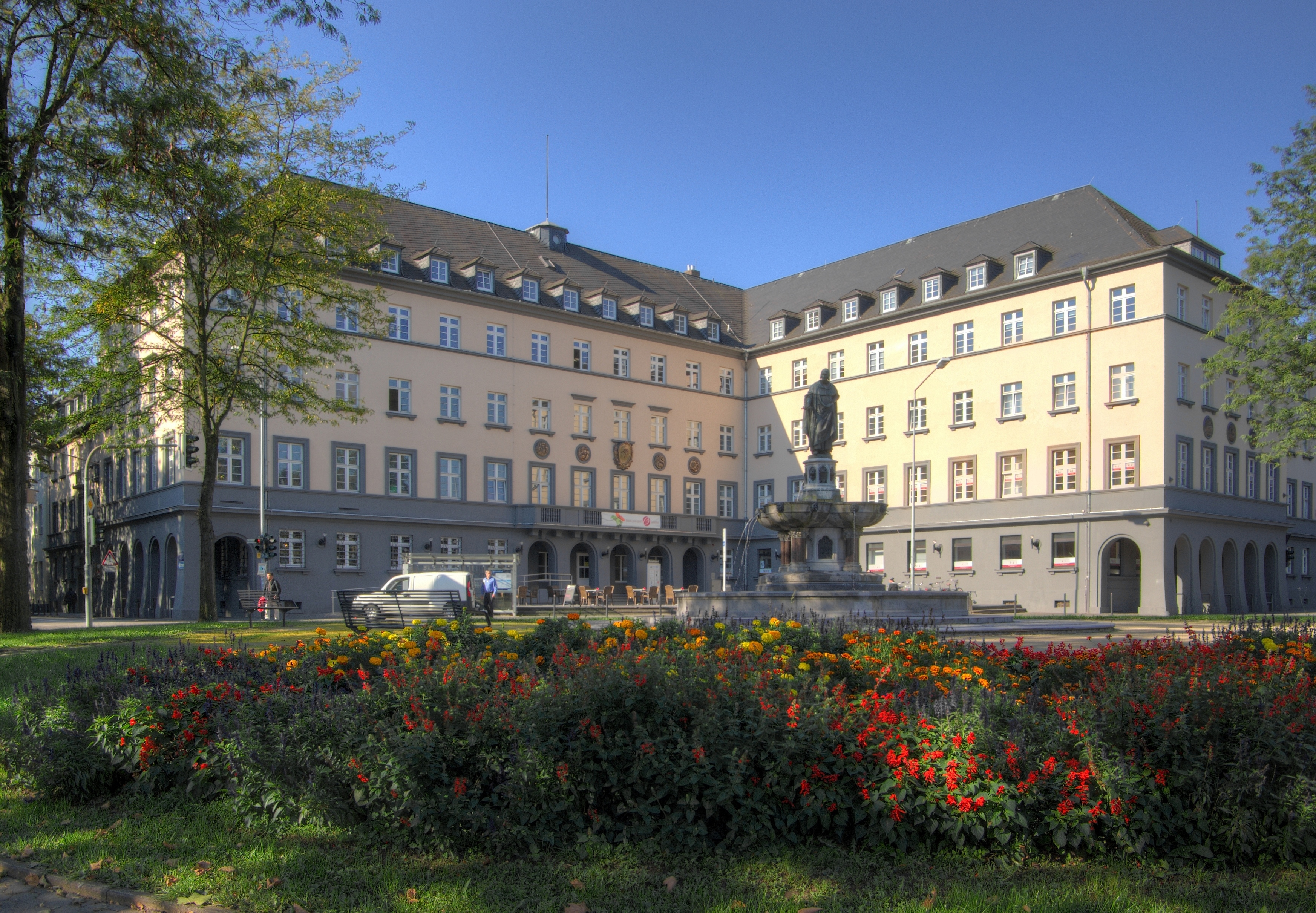 Trier, Christophstraße 1/Balduinstraße 6: ehemalige Reichsbahndirektion mit ehemaligem Bediensteten-Wohnflügel; Vierflügelanlage, barockisierender Heimatstil, bezeichnet 1922–25, Architekt Karl Albermann; dreigeschossiger Mitteltrakt mit Mansarddach, viergeschossige Seitenflügel mit Walmdächern; Ausstattung; stadtbildprägend Balduinstraße ohne Nummer: Balduinbrunnen; zweistufiger neuromanischer Kalksteinbrunnen mit Bronzeplastik Balduins, 1897; Bronzegussarbeiten: Entwurf Ferdinand von Miller, Ausführung Quinter Eisenhütte; Steinmetz Arnold Schüller